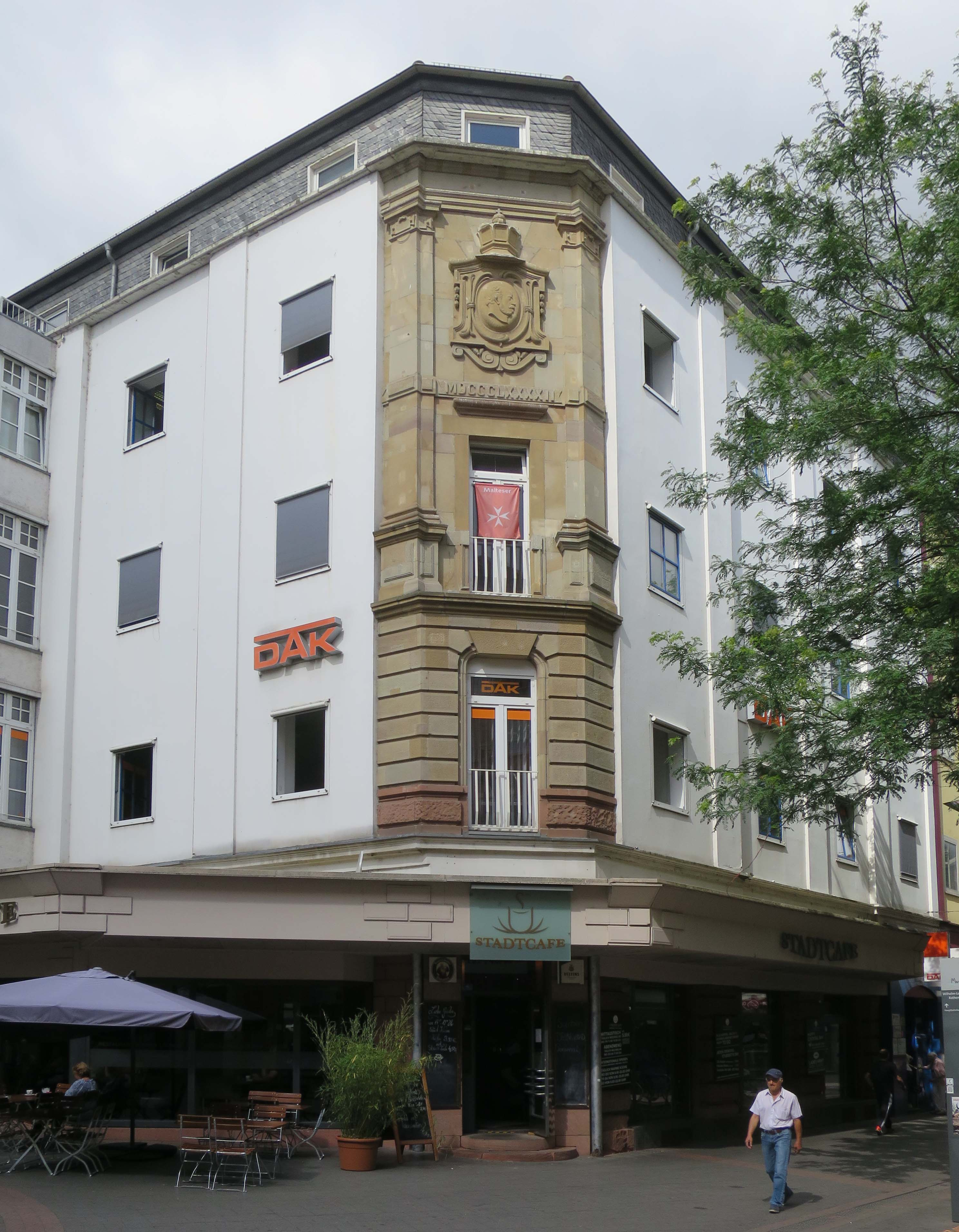 Worms, Wilhelm-Leuschner-Straße 19